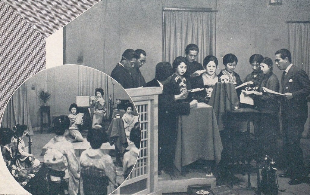 ラジオ放送。右はラジオドラマ収録中の粟島すみ子（中央）、東栄子（その左）など松竹蒲田撮影所の映画俳優ら。左は演奏中の新橋芸者たち。